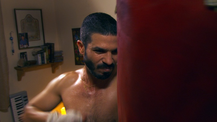 רועי אסף מתוך הסרט המשגיחים